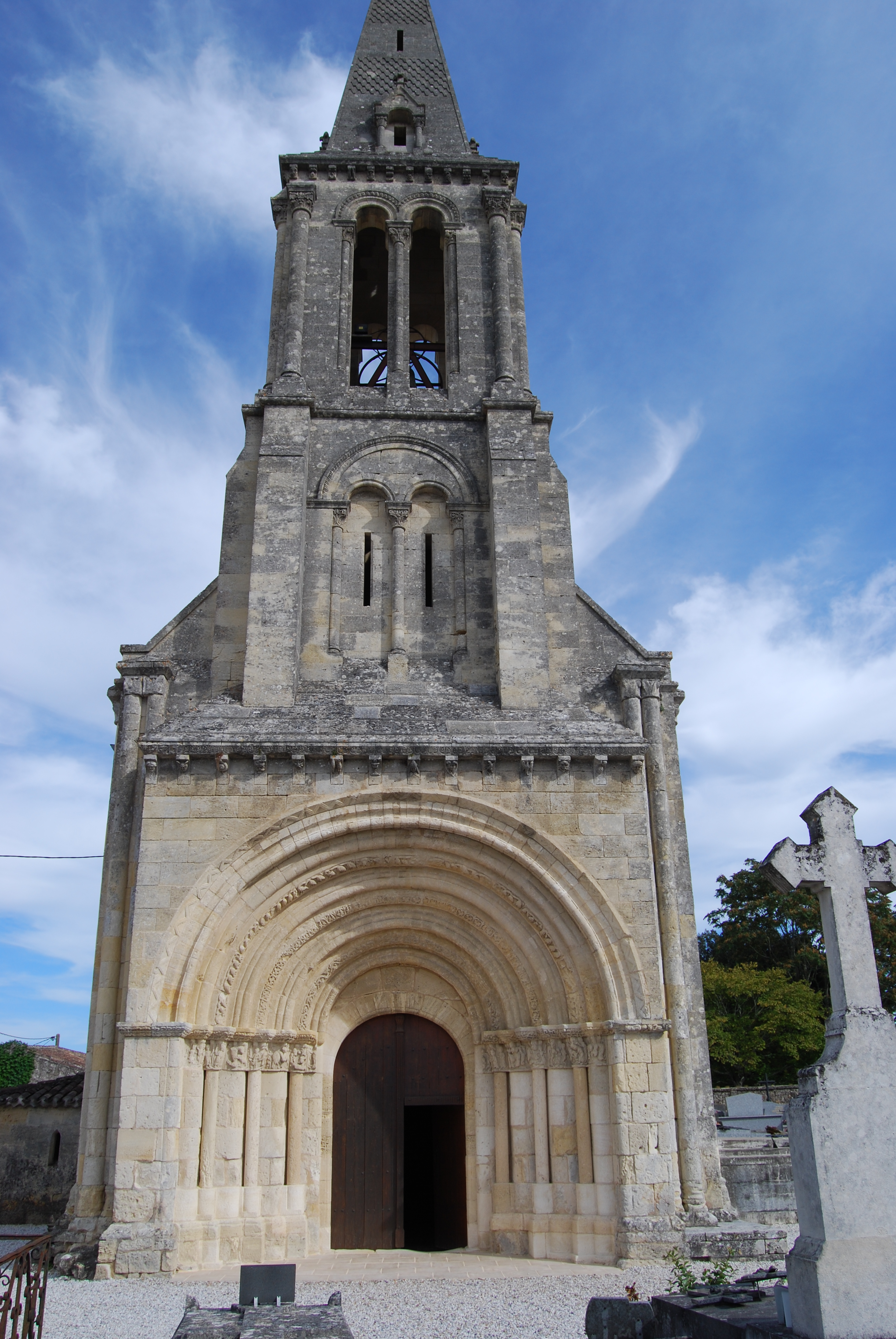 Église Saint-Christophe de Saint-Christophe-des-Bardes, (Classé, 1908) .